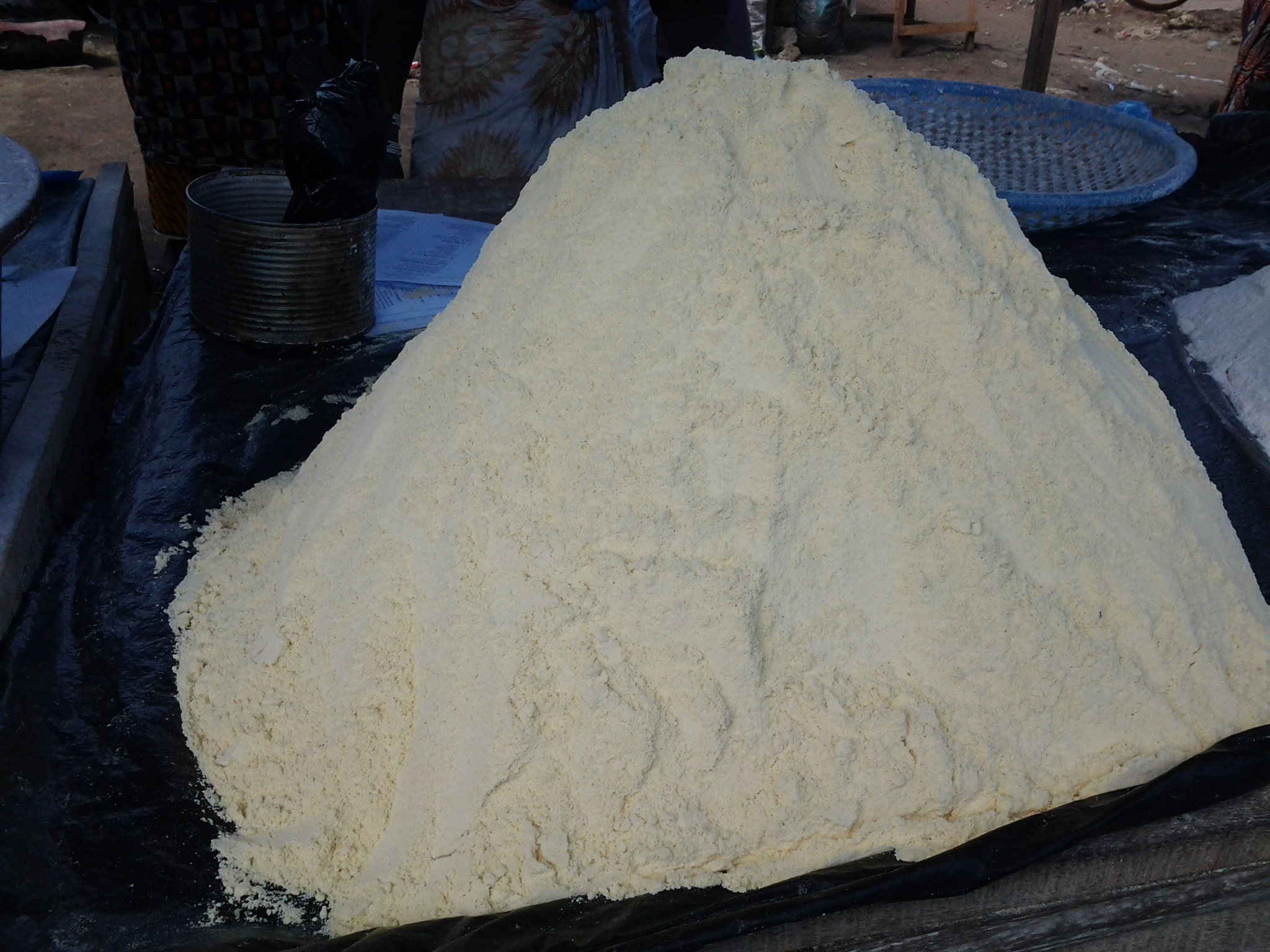 Farine de maïs en vente sur un marché d'Abidjan This is an image of food from Ivory Coast